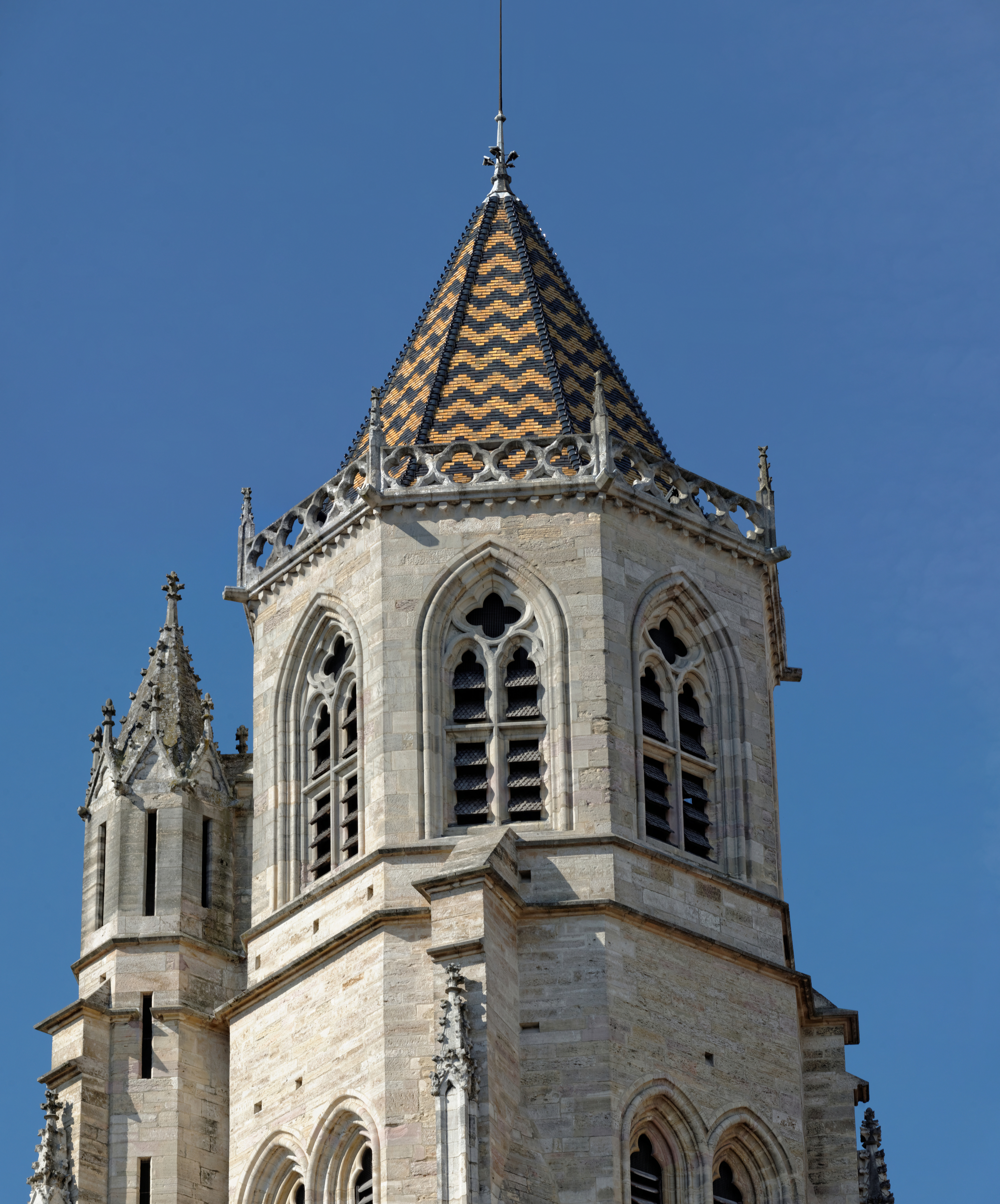 Tuiles vernissées de la Cathédrale Saint-Bénigne de Dijon (Côte d'Or, Bourgogne, France). .